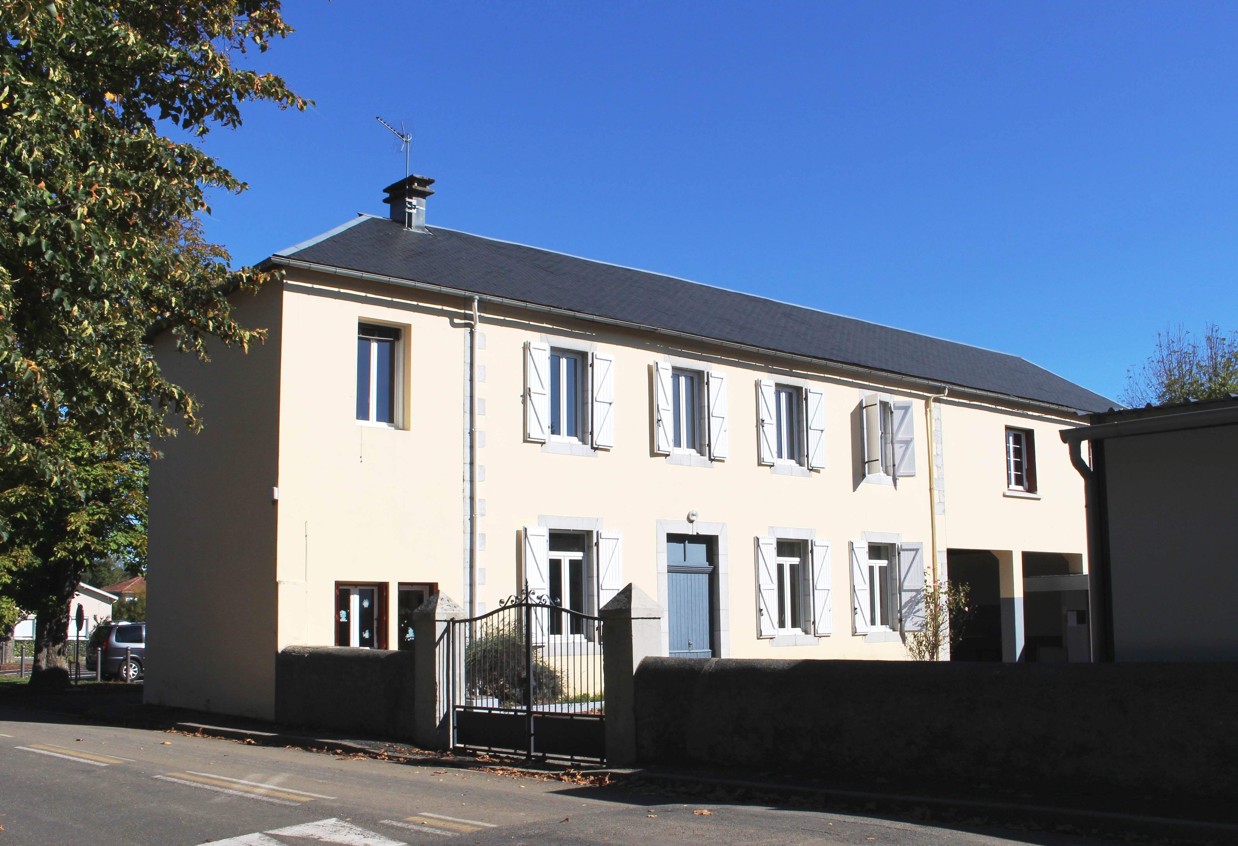 École de Cantaous (Hautes-Pyrénées)